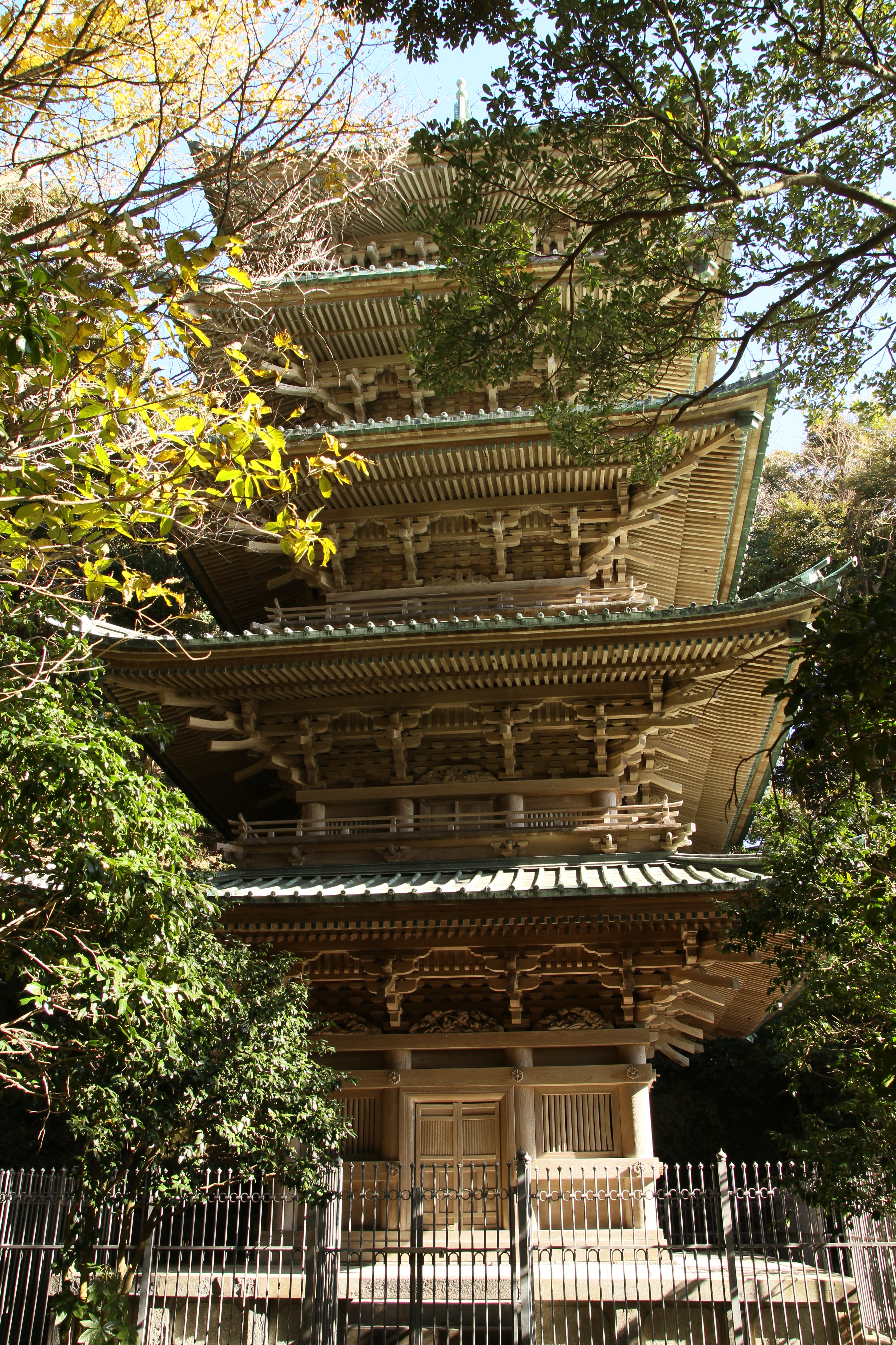 龍口寺五重塔